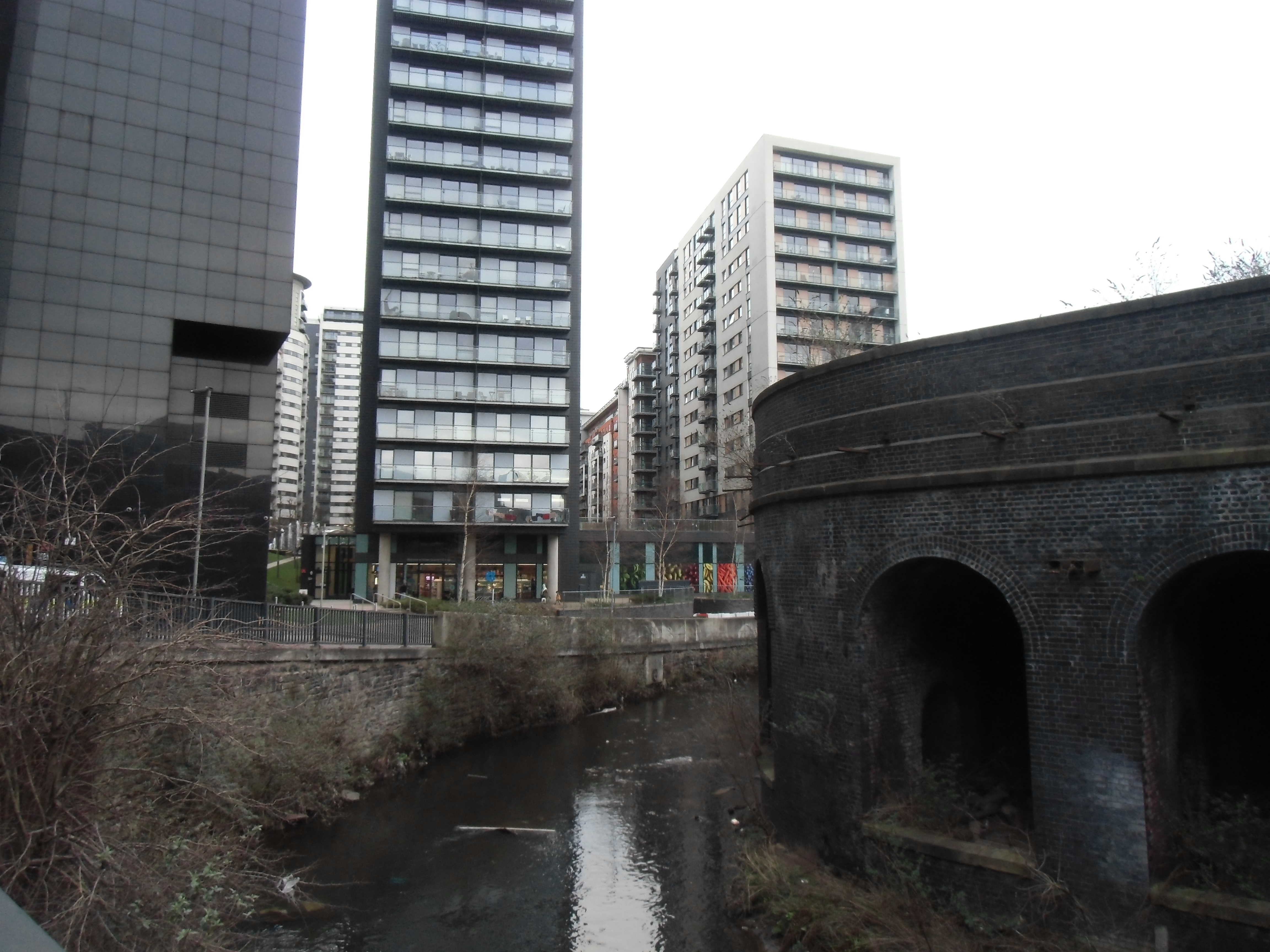 Green Quarter, Manchester